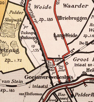 Oukoop_en_Negenviertel